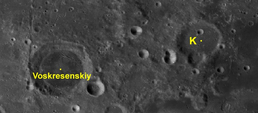 Cráter lunar Voskresenskiy. Cráteres satélite. (Imagen LRO)